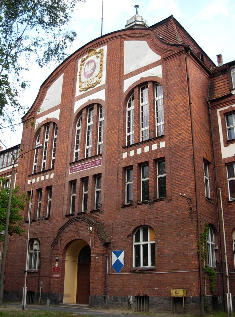 Budynek Wydziału Chemii UTP w Bydgoszczy, ul Seminaryjna 3 (inż. Huber z Berlina, 1905-08), dawniej katolickie seminarium nauczycielskie powołane w 1907 r.